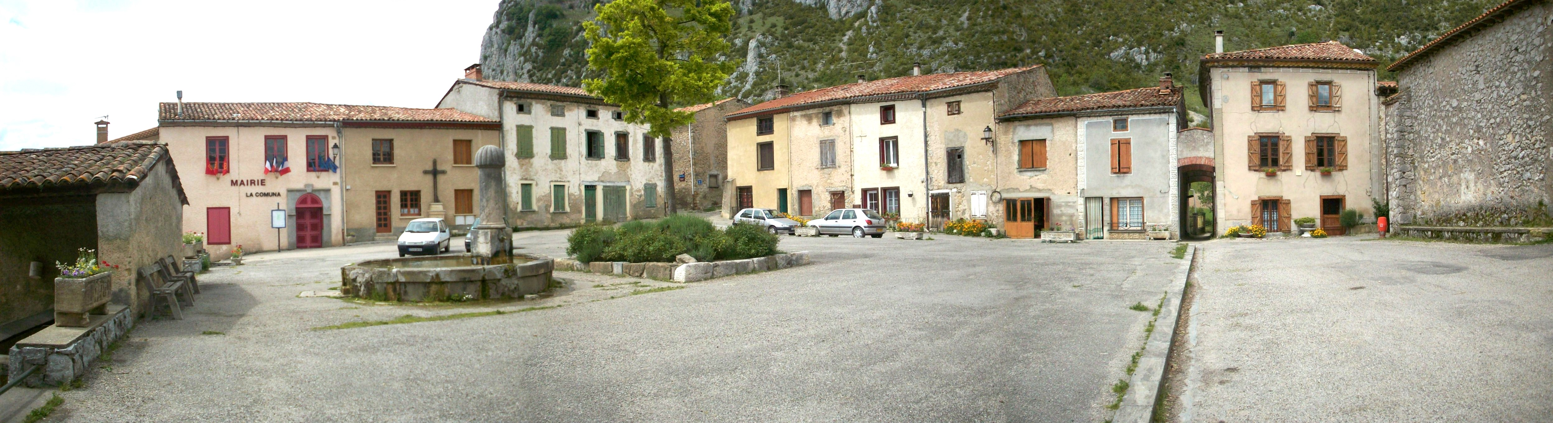 Place du village (Roquefixade, 09)